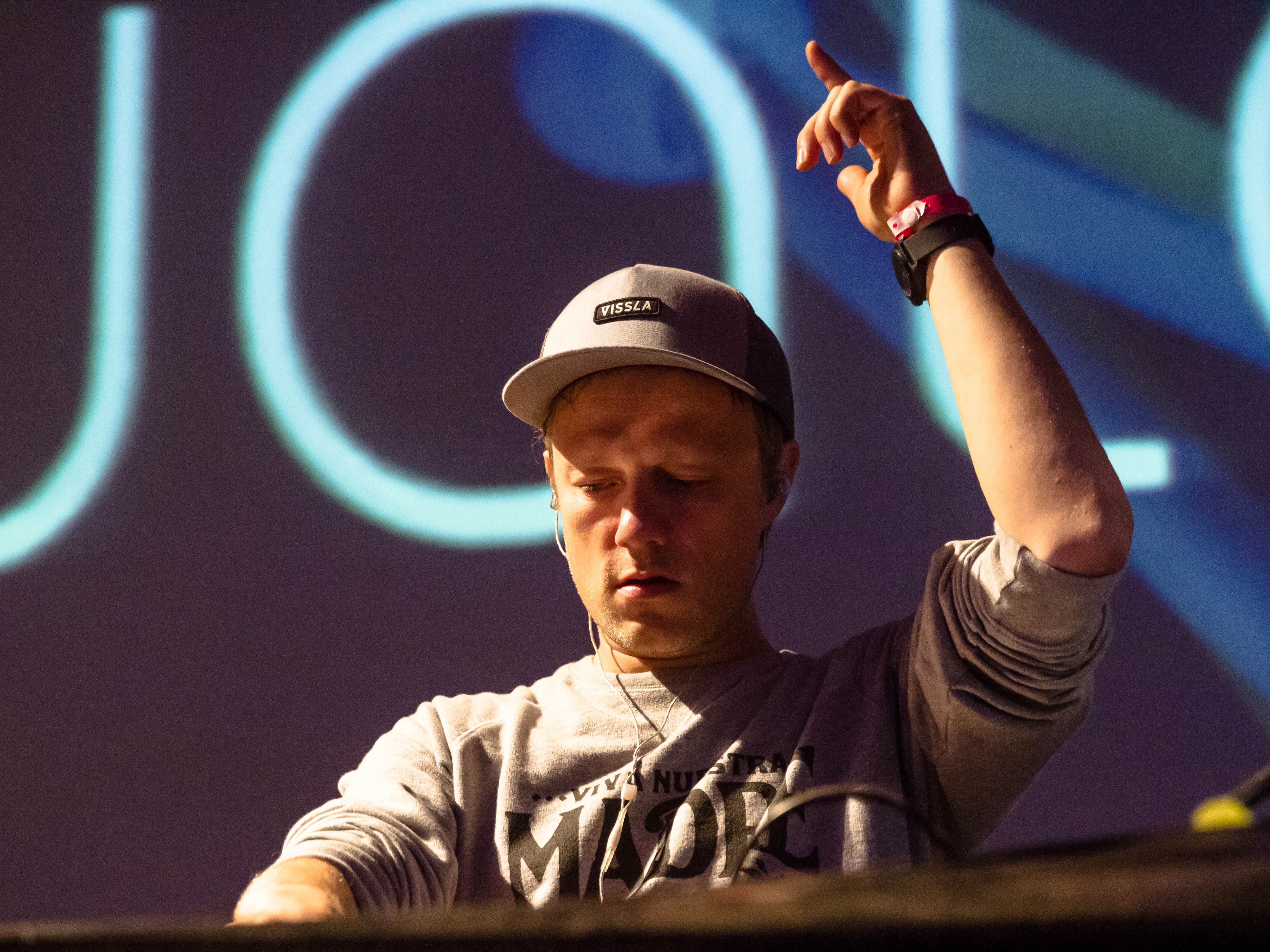 Watermät beim 14. Airbeat-One Dance Festivals das vom 16. bis 19. Juli 2015 auf dem Flugplatz Neustadt-Glewe stattfand.